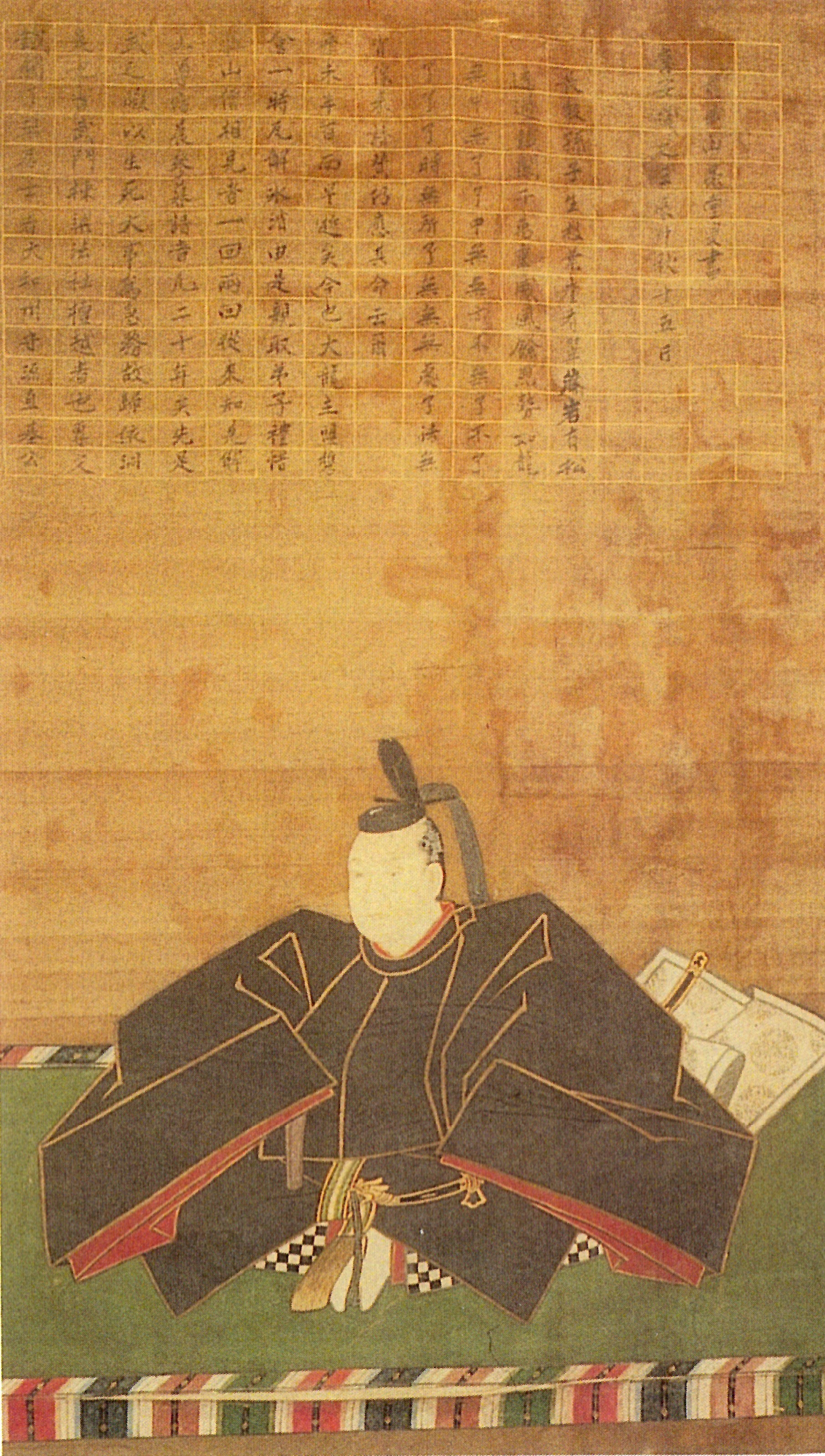 松平直基の肖像。